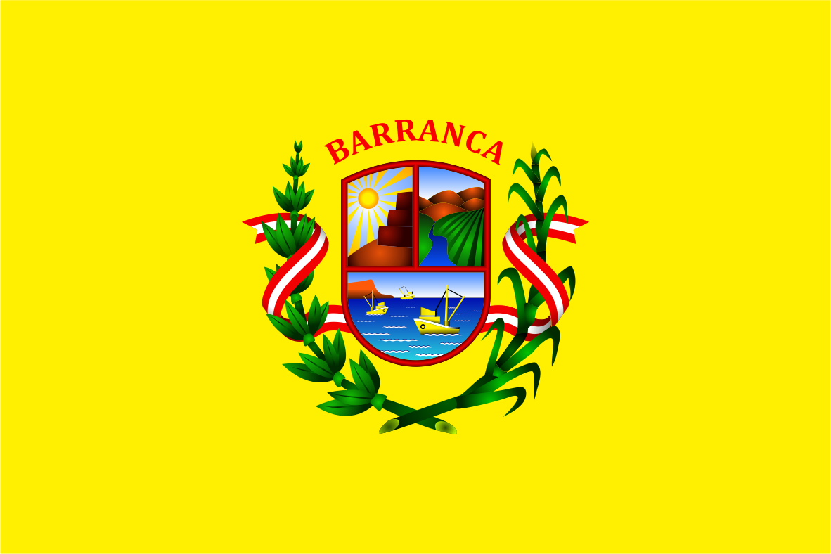 Distrito de Barranca - Provincia de Barranca - Región Lima